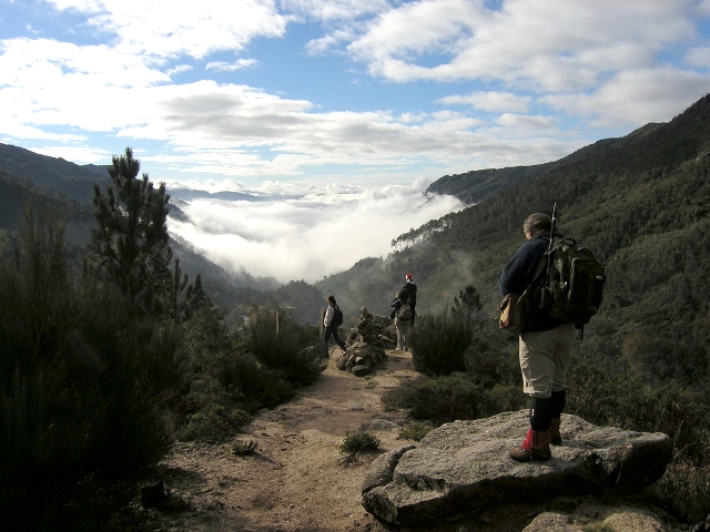 Em pleno Parque Nacional Peneda Gerês - Terras de Bouro